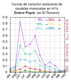 Curva de Variación Estacional Estero Pupío en el Romero. # cita publicación # | apellido = Dirección General de Aguas # | nombre = # | enlace-autor = Ministerio de Obras Públicas (Chile) # | título = Diagnóstico y clasificación de los cursos y cuerpos de agua según objetivos de calidad. Cuenca Estero Pupío # | ubicación = Santiago de Chile # | editorial = Ministerio de Obras Públicas (Chile) # | año = 2004 # | edición = # | url = # | urlarchivo = # | fechaarchivo = # | ref = harv # Tabla 4.1: Estero Pupío en el Romero (m3/s) pág. 28 mes 5% 10% 20% 50% 85% 95% abr 0.0590 0.0455 0.0332 0.0182 0.0087 0.0056 may 0.0970 0.0750 0.0540 0.0270 0.0070 0.0004 jun 0.8200 0.4440 0.2110 0.0500 0.0080 0.0020 jul 0.4171 0.3028 0.2055 0.0979 0.0393 0.0230 ago 0.4615 0.2950 0.1716 0.0609 0.0170 0.0080 sep 0.5990 0.3540 0.1870 0.0540 0.0100 0.0020 oct 0.2765 0.1825 0.1104 0.0422 0.0129 0.0064 nov 0.1160 0.0837 0.0563 0.0264 0.0104 0.0060 dic 0.1660 0.0950 0.0480 0.0130 0.0020 0.0001 ene 0.1107 0.0486 0.0179 0.0027 0.0003 0.0001 feb 0.0268 0.0216 0.0166 0.0101 0.0054 0.0038 mar 0.0378 0.0287 0.0205 0.0108 0.0049 0.0031 This plot was created with Gnuplot.